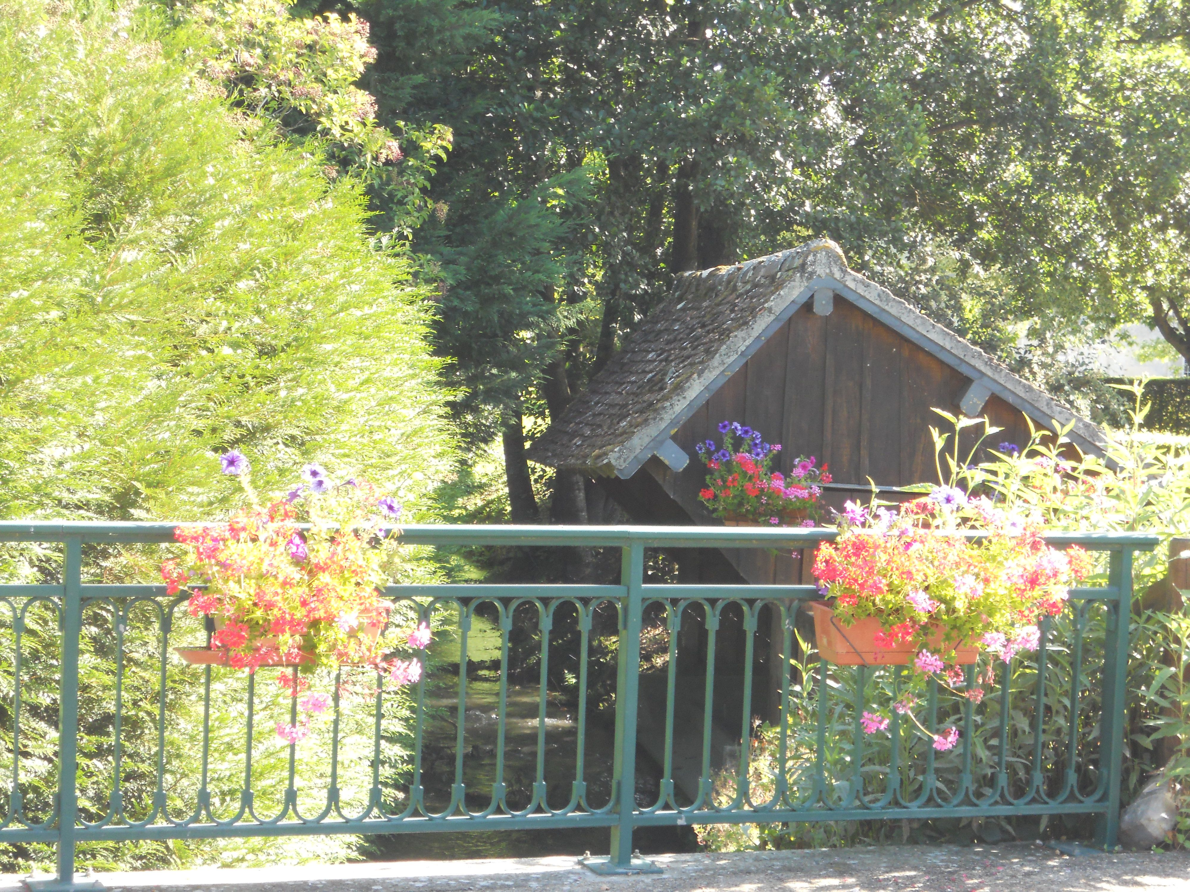 Le lavoir communal de Sainte-Céronne-lès-Mortagne, vu de l'autre côté de la route